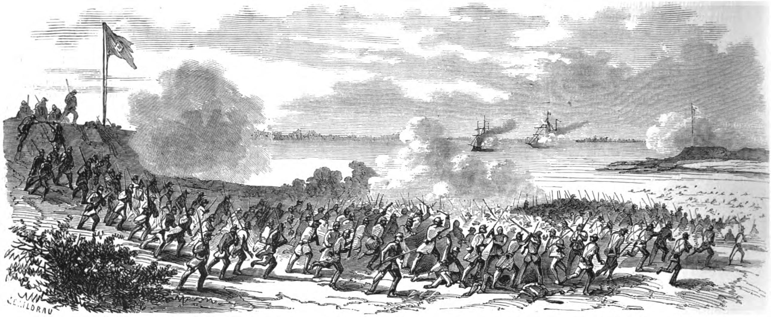 Guerre du Paraguay. - Combat de l’isle de la Rédempcion das le Paraná (10 avril): la 19ª brigade brésillienne commandée par le colonel Villagran Cabrita repoussant l’assaut des paraguayens.